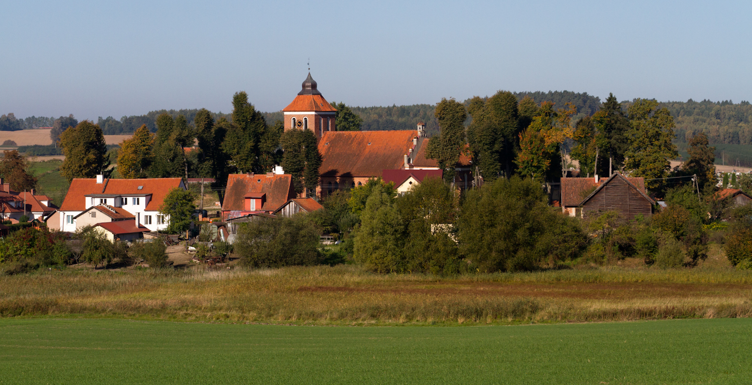 wrześniowa panorama wsi Bartąg